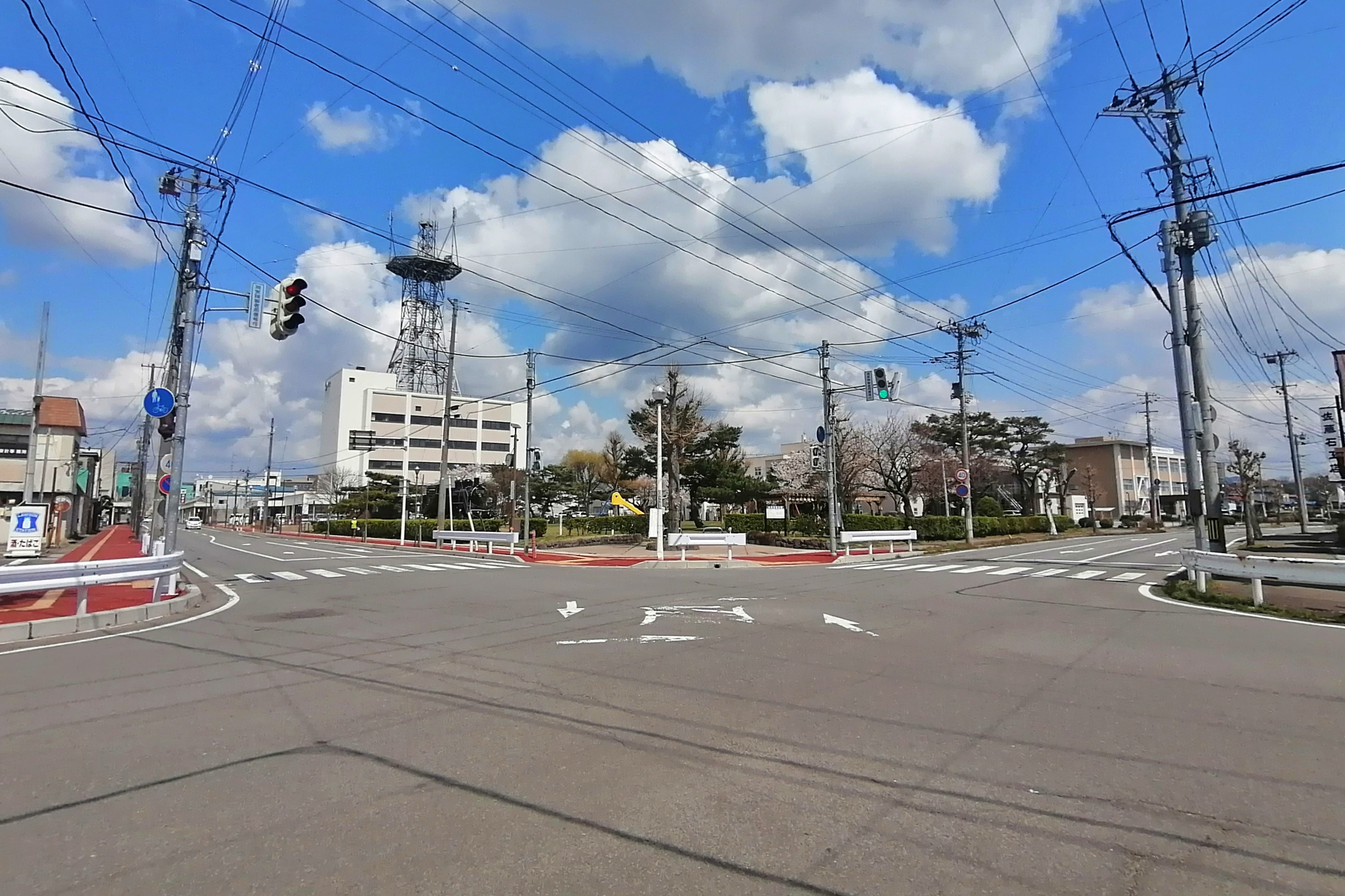 米代児童公園 - 北秋田市